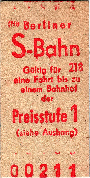 S-Bahn-Fahrkarte für das West-Netz